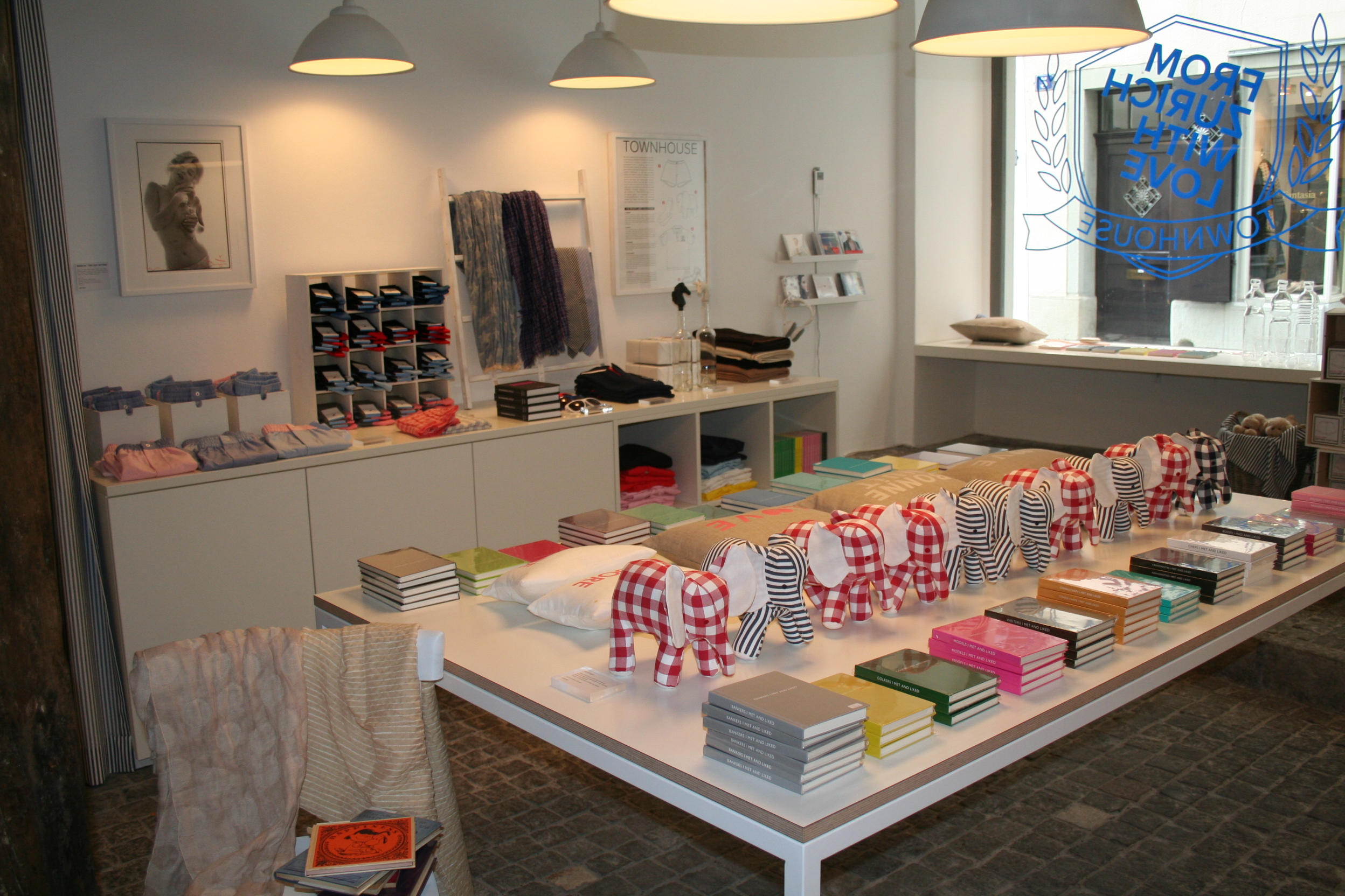 Concept-Store «Townhouse» an der Weiten Gasse in Zürich